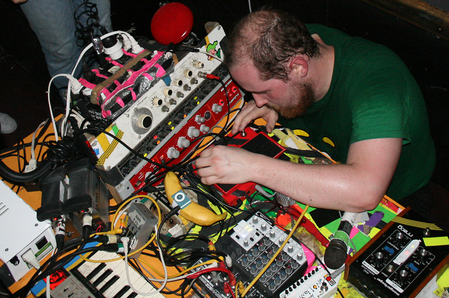 Dan Deacons Equipment